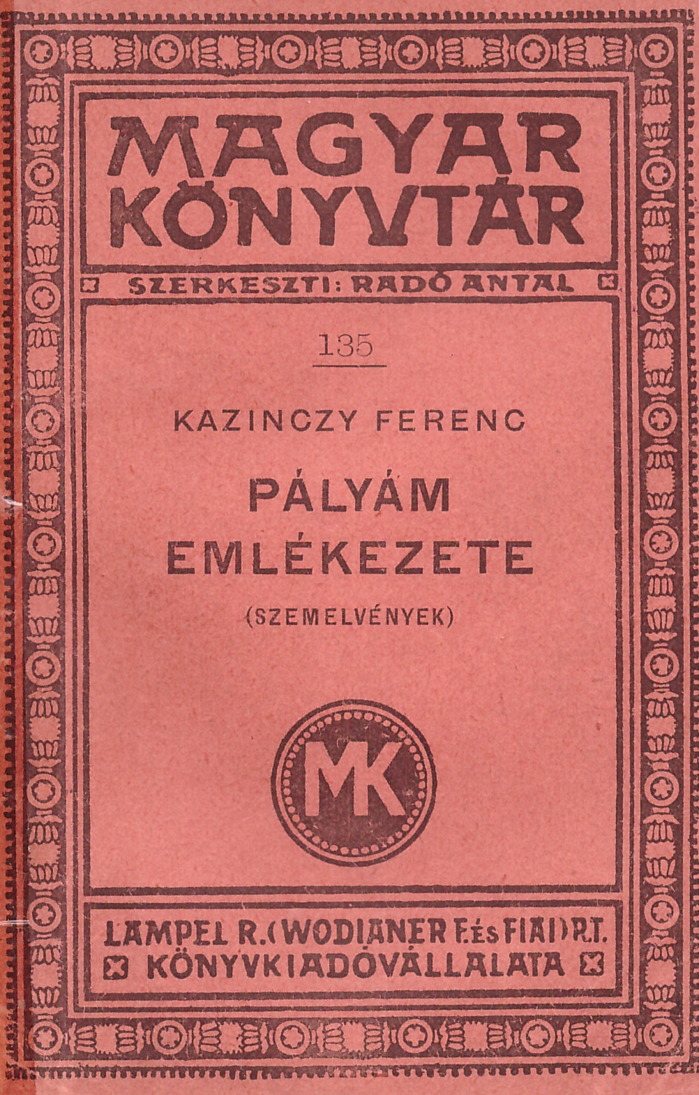 Kazinczy Ferenc (1759-1831) Pályám emlékezete (1910 körüli kiadás)